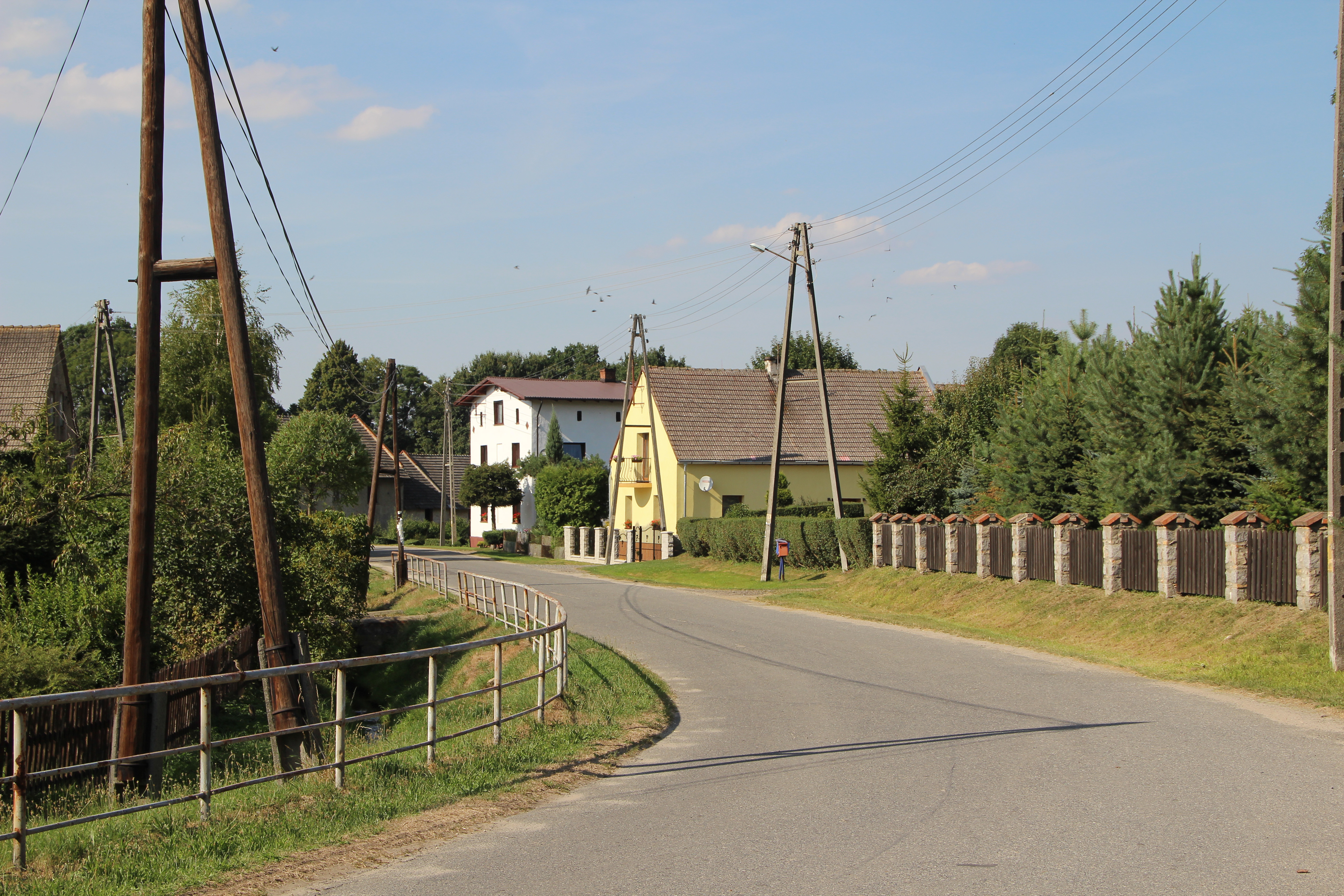 Piorunkowice – wieś w Polsce położona w województwie opolskim, w powiecie prudnickim, w gminie Prudnik.